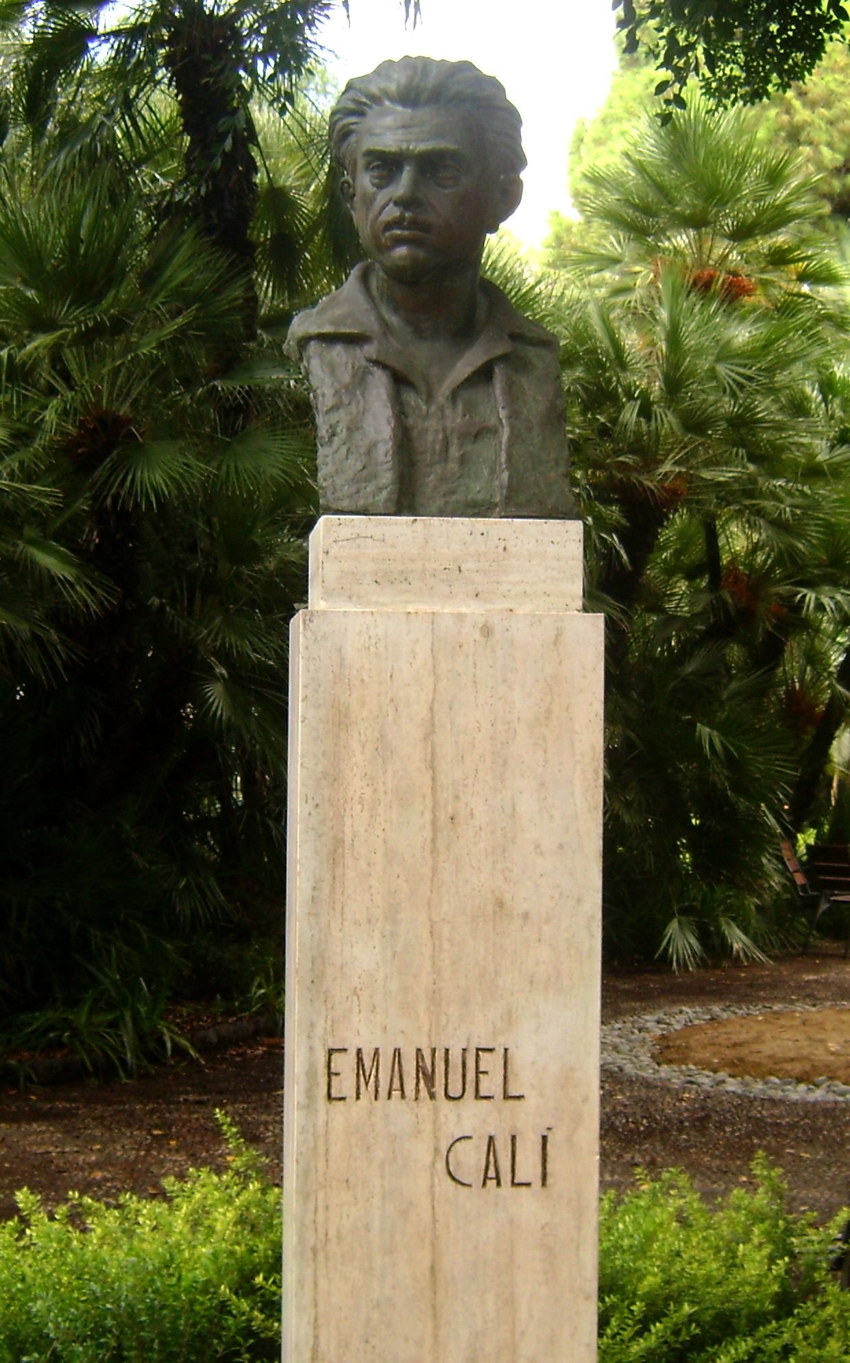 Emanuel Calì - Giardino Bellini - settembre 2010